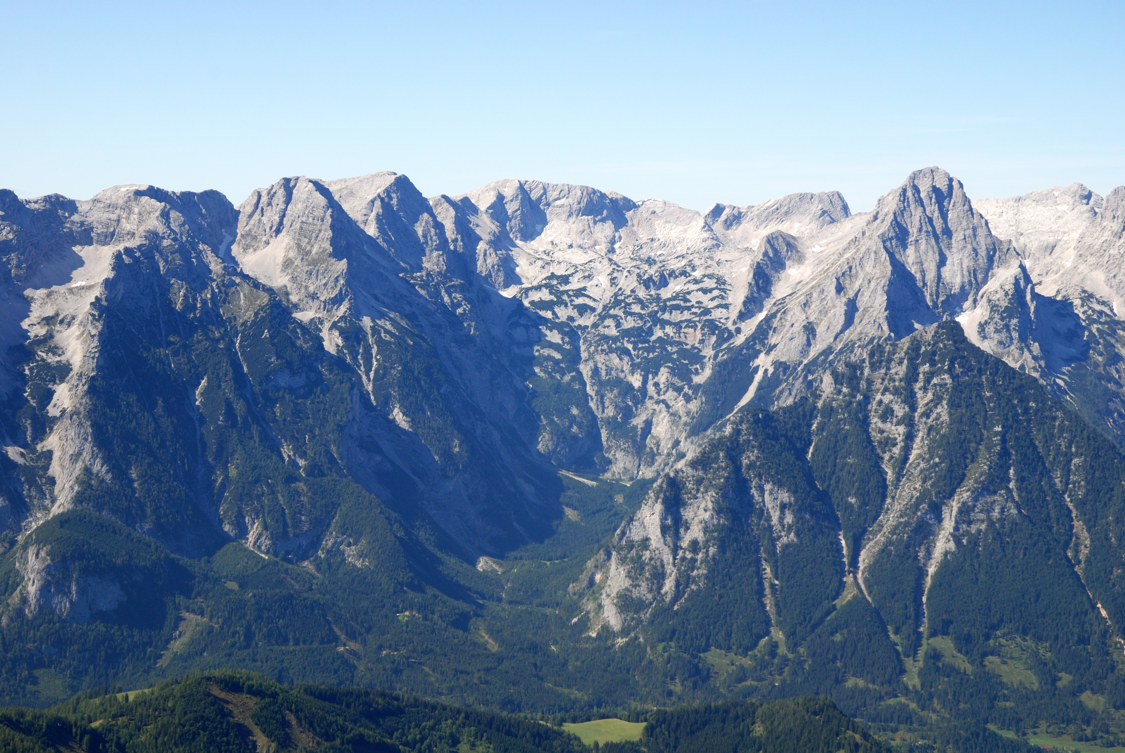 Blick auf den Ostabfall der Prielgruppe mit Großem Hochkasten, Feuertalberg und Spitzmauer, Totes Gebirge, Österreich. In der Bildmitte der Trogschluss der Dietlhöll